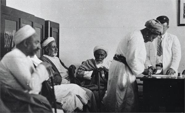 ירושלים - חתימה על חוזה שלום בין כפר ערבי בית צפפהובין מקור חיים.